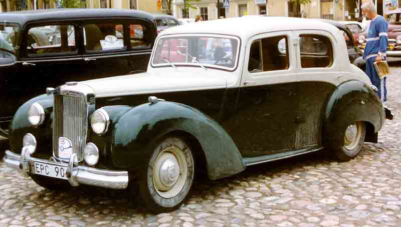 Alvis TA 21 Saloon 1950